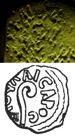 Im Jahr 29 oder 30 unter Pontius Pilatus geprägte Münze, deren Muster angeblich im rechten Auge des Antlitzes auf dem Turiner Grabtuch erkennbar sein soll (nach: Alan Whanger, 1985, siehe auch seinen Blog [1]). Oben der Ausschnitt aus dem Auge, darunter die entsprechende Münze (Zeichnung von F.W. Madden, 1864)